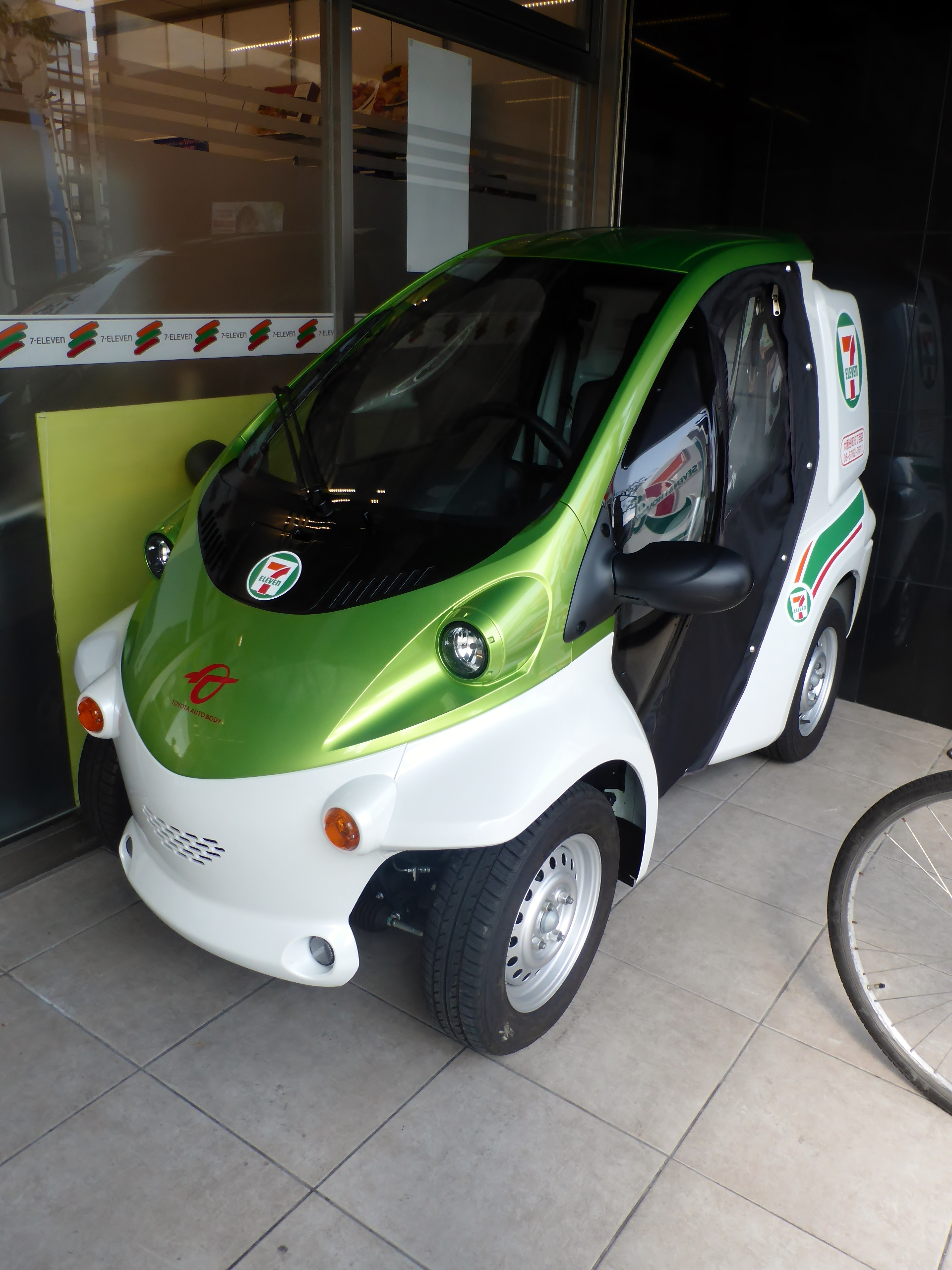 セブンイレブンの配達用車両を撮影。